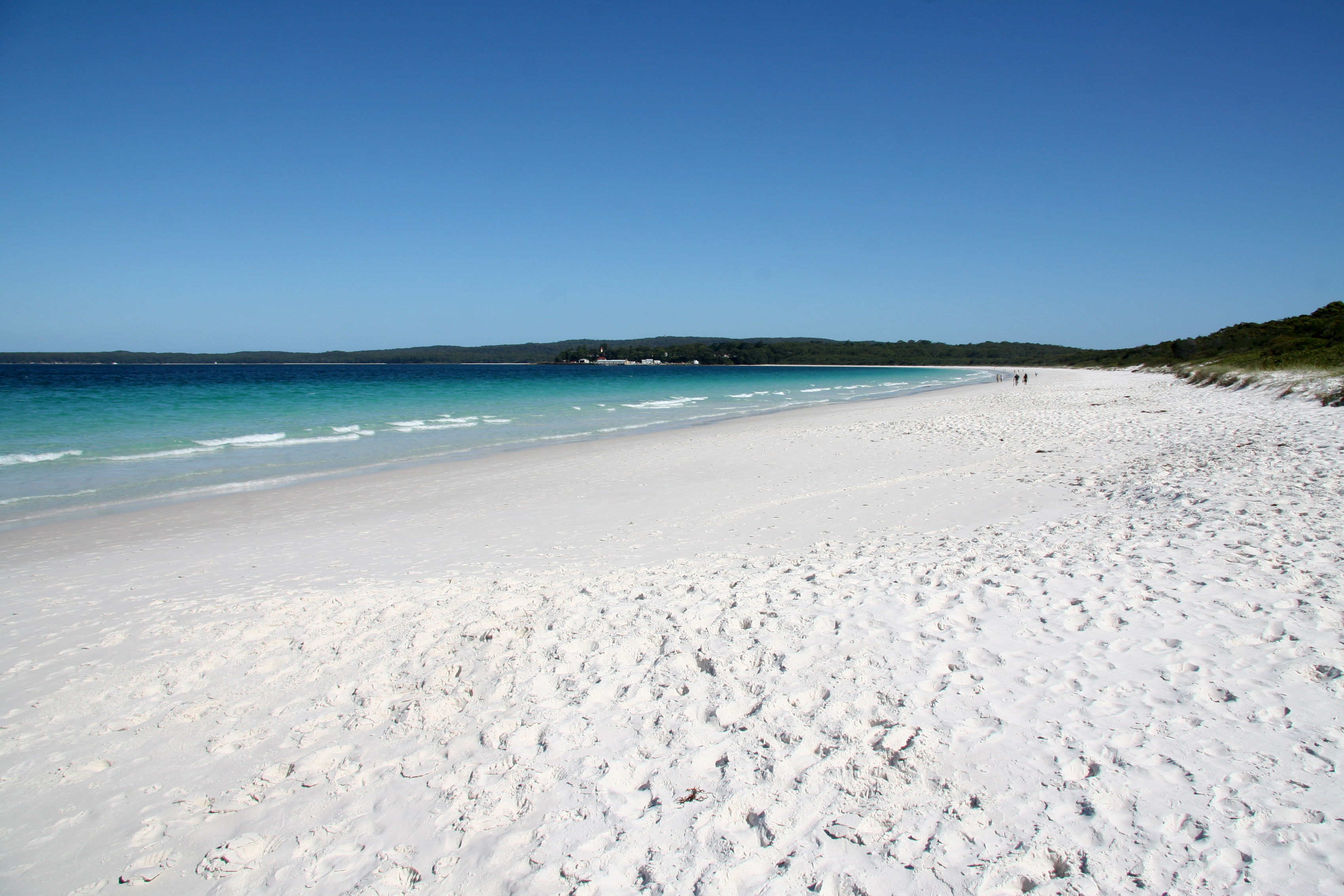 Hyams Beach at Jervis Bay, New South Wales, Australia